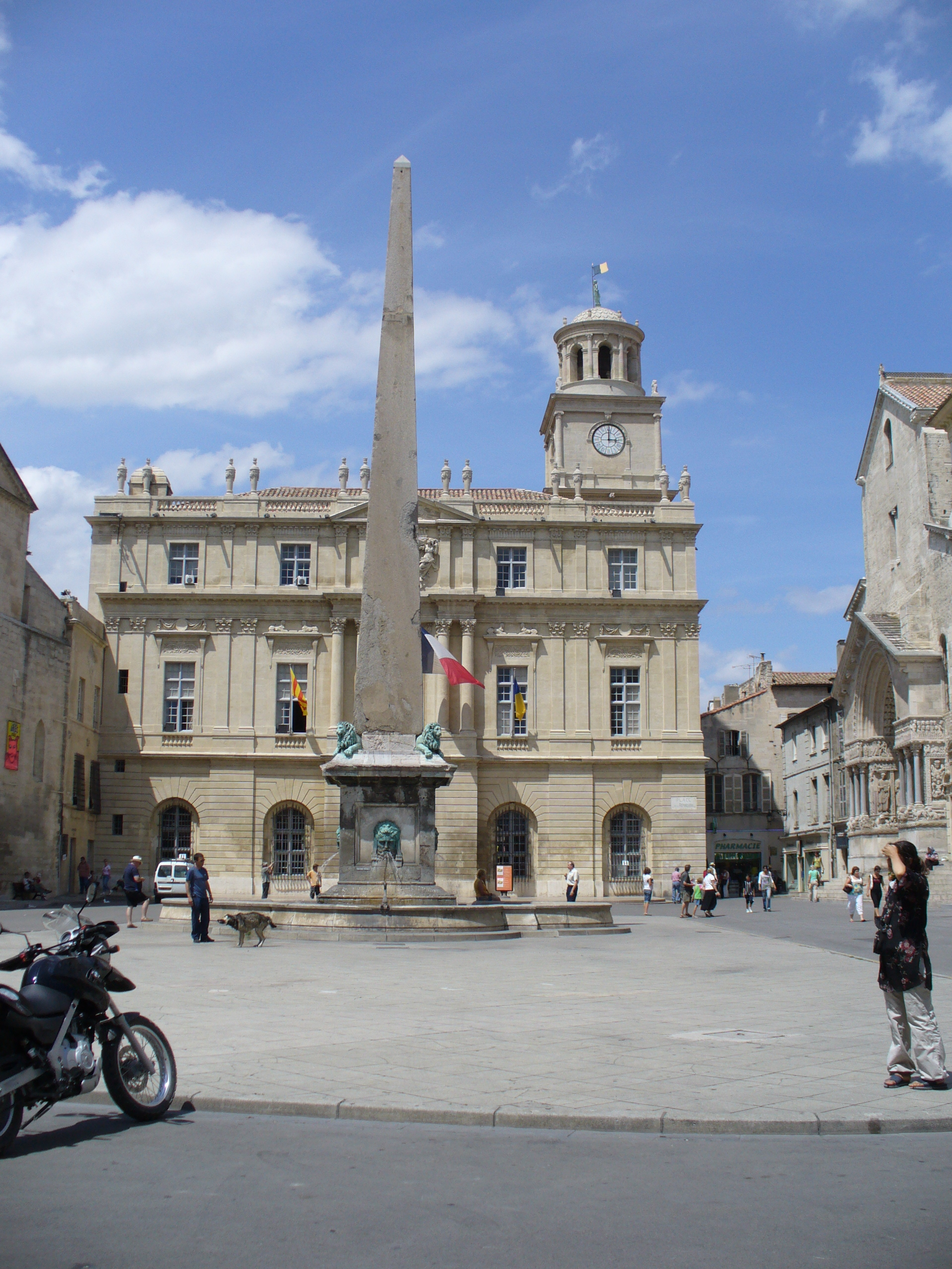 43°40′34.2″N 4°37′39.2″E / 43.676167°N 4.627556°E